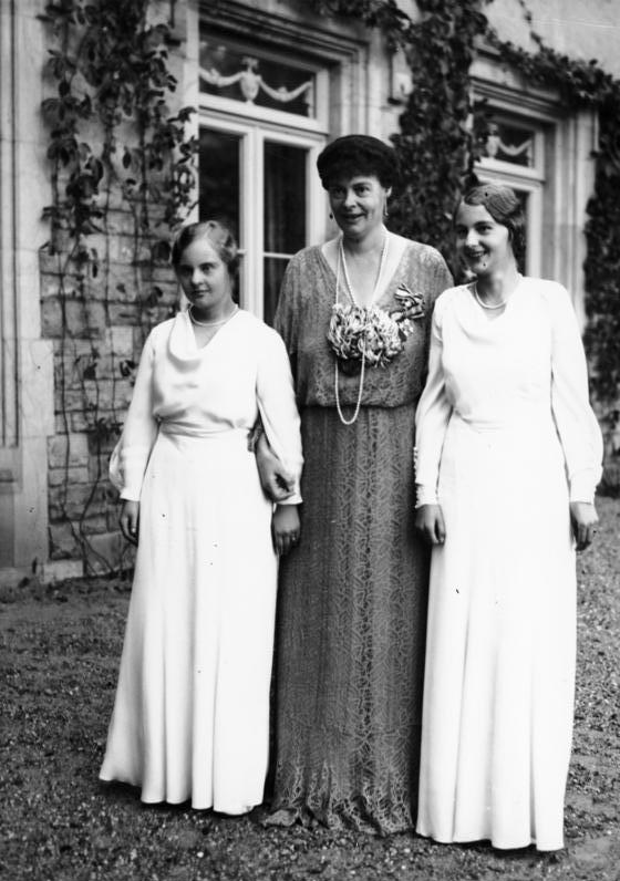 Potsdam, Kronprinzessin Cecilie mit ihren Töchtern Scherl: Konfirmation der beiden Töchter des Kronprinzenpaares in Schloss Cecilienhof in Potsdam. v.l. Prinzessin Alexandrine.[22.10.1934], die Kronprinzessin, Prinzessin Cecilie 40869-34 Abgebildete Personen: Preußen, Cecilie von: 1886-1954, verheiratet mit Kronprinz Wilhelm, Tochter Großherzog Friedrich Franz III. von Mecklenburg-Schwerin, Deutschland Preußen, Cecilie von (Tochter, rechts): 1917-1975 Preußen, Alexandrine von (Tochter, links): (1915-1980)